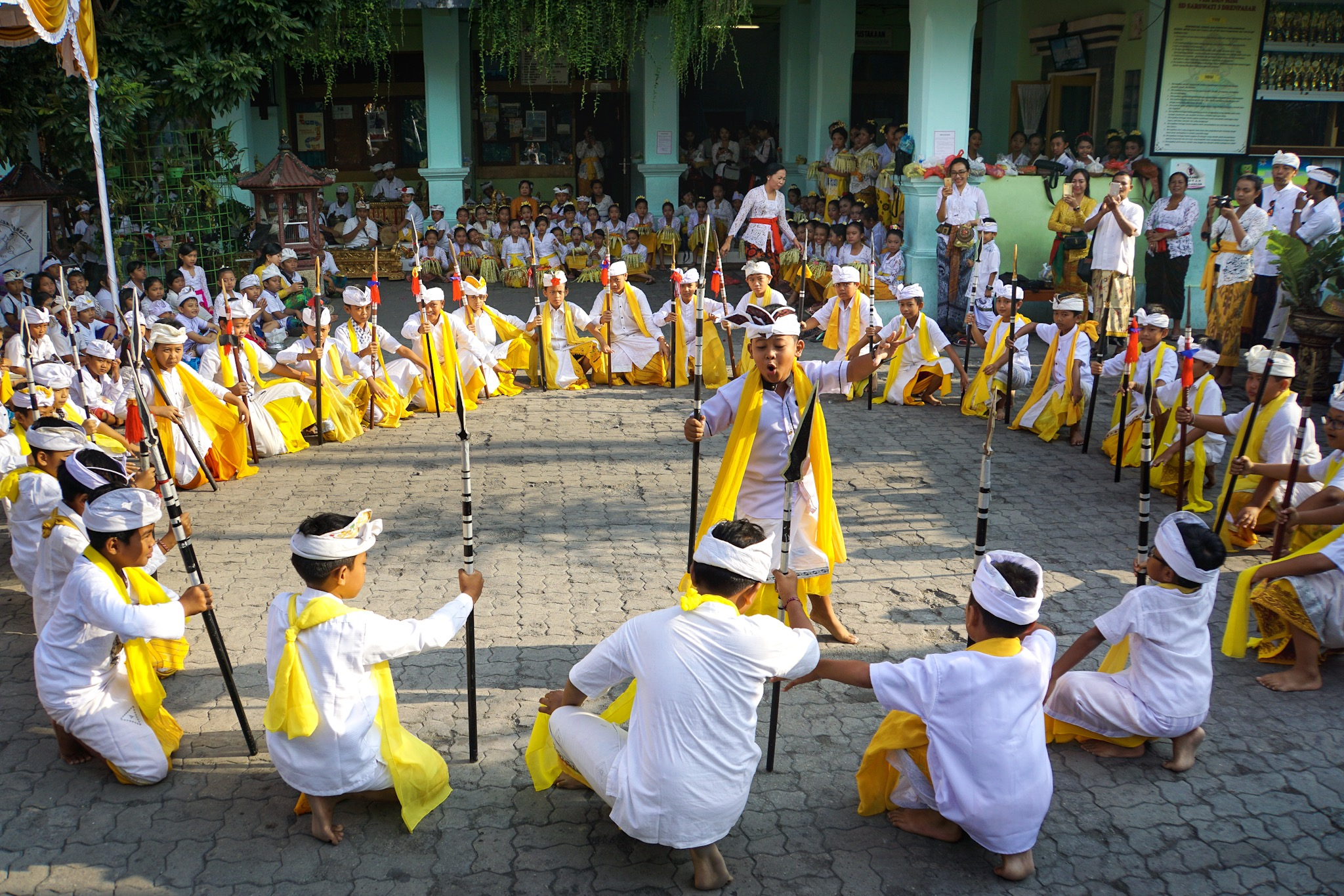 Persembahan Tari Baris oleh siswa-siswa SD dalam rangka Hari Raya Saraswati di Bali.